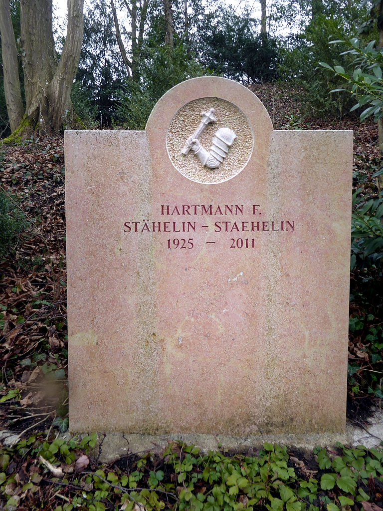 Hartmann F.Stähelin-Staehelin (1925–2011) Pharmakologe, Mikrobiologe, Entdeckung von Ciclosporin bei Sandoz, Grab auf dem Friedhof Hörnli, Riehen, Basel-Stadt